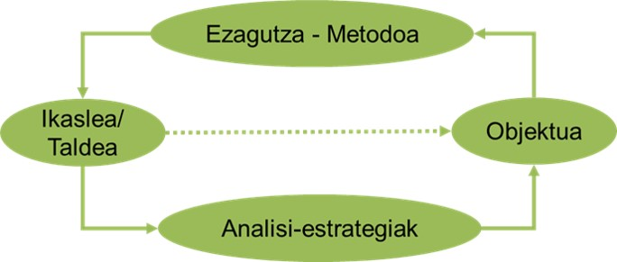 Ikasleak edo taldeak, analisirako estrategia desberdinak erabiliz -normalean, galderen bidez- objektu batek bere baitan duen ezagutza bereganatuko du.